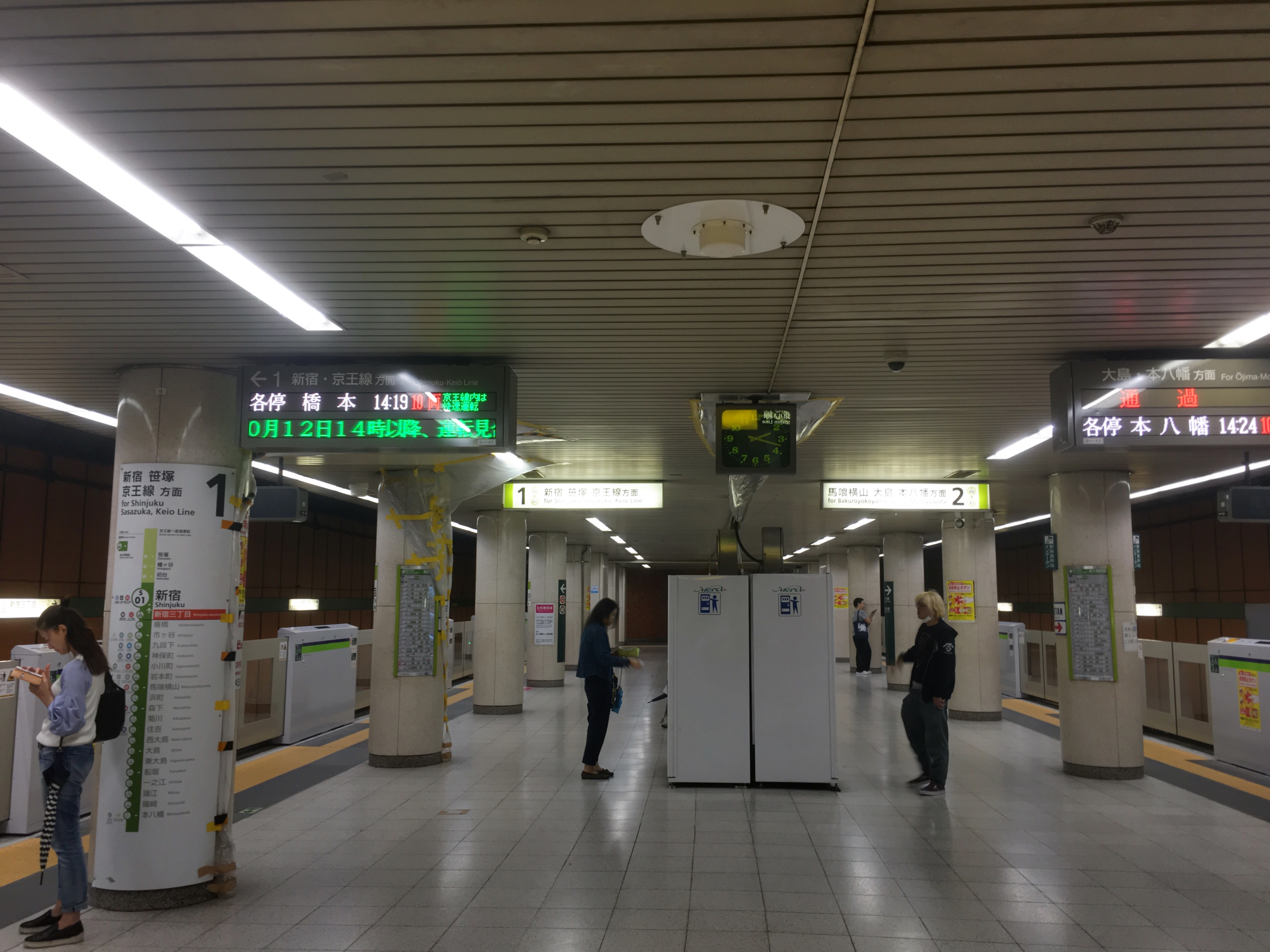 新宿線、新宿三丁目駅のホーム (Shinjuku Line, shinjuku-Sanchōme Station platforms)